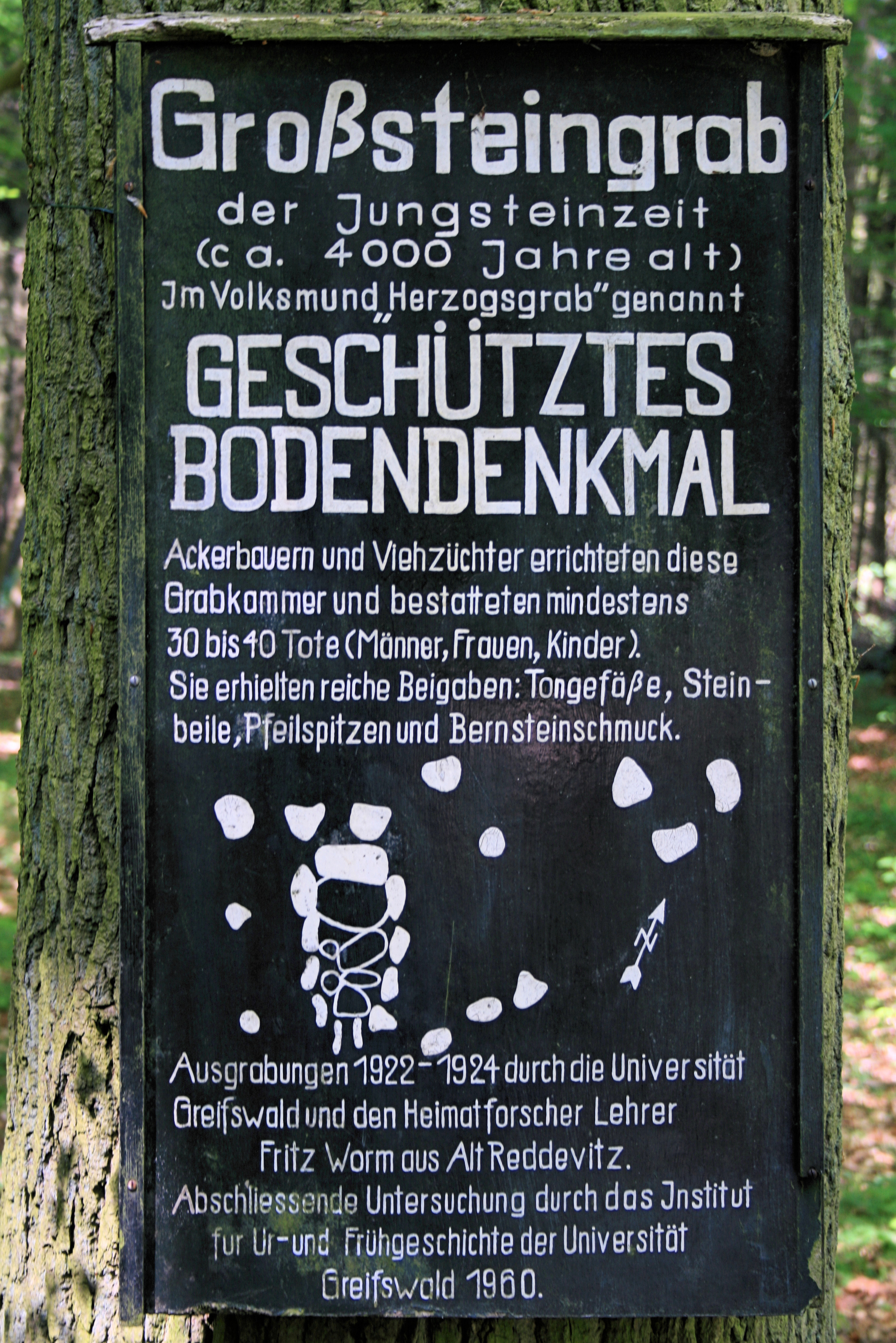 Alte Informationstafel am Großsteingrab „Herzogsgrab“ im Mönchguter Forst auf der Ostseeinsel Rügen.